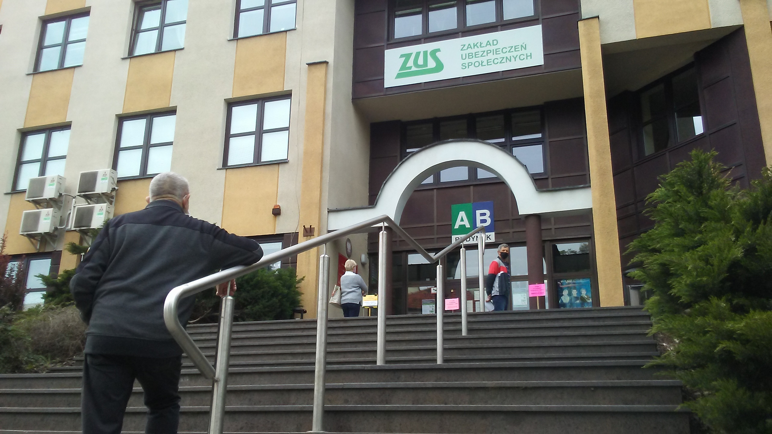 Kolejka do ZUSu w Tomaszowie Mazowieckim podczas pandemii SARS-CoV-2